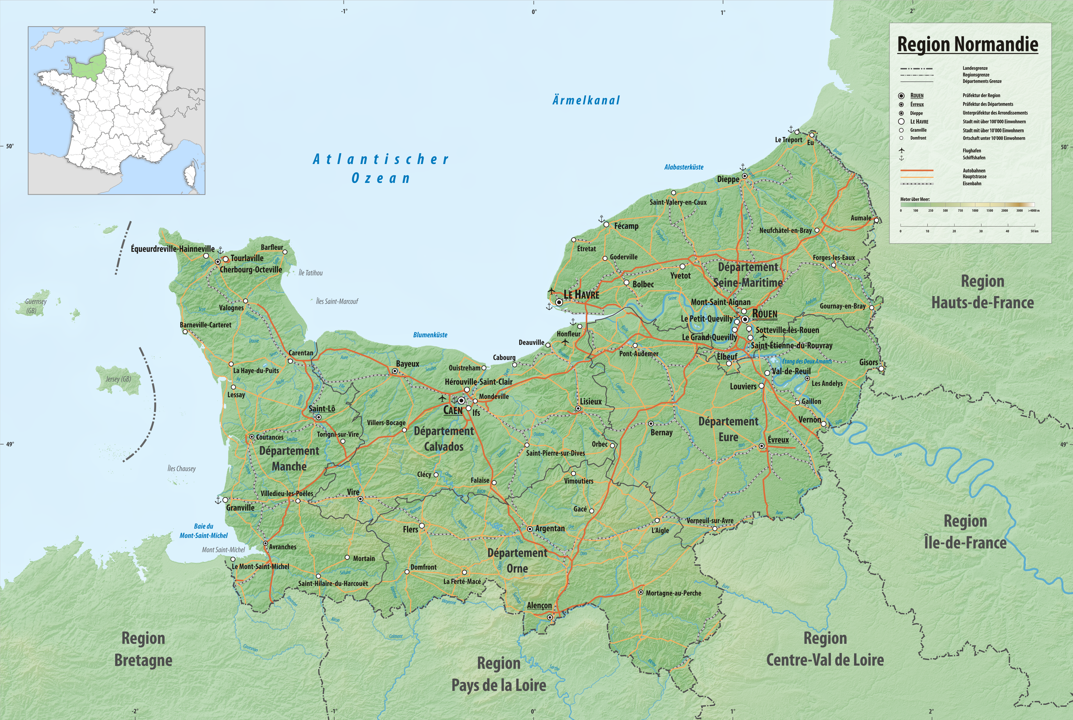 Reliefkarte der Region Normandie Topographischer Hintergrund: NASA Shuttle Radar Topography Mission (public domain). SRTM3 v.2.